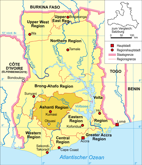 politische Karte Ghanas (Ashanti Region mit der Stadt Obuasi hervorgehoben)